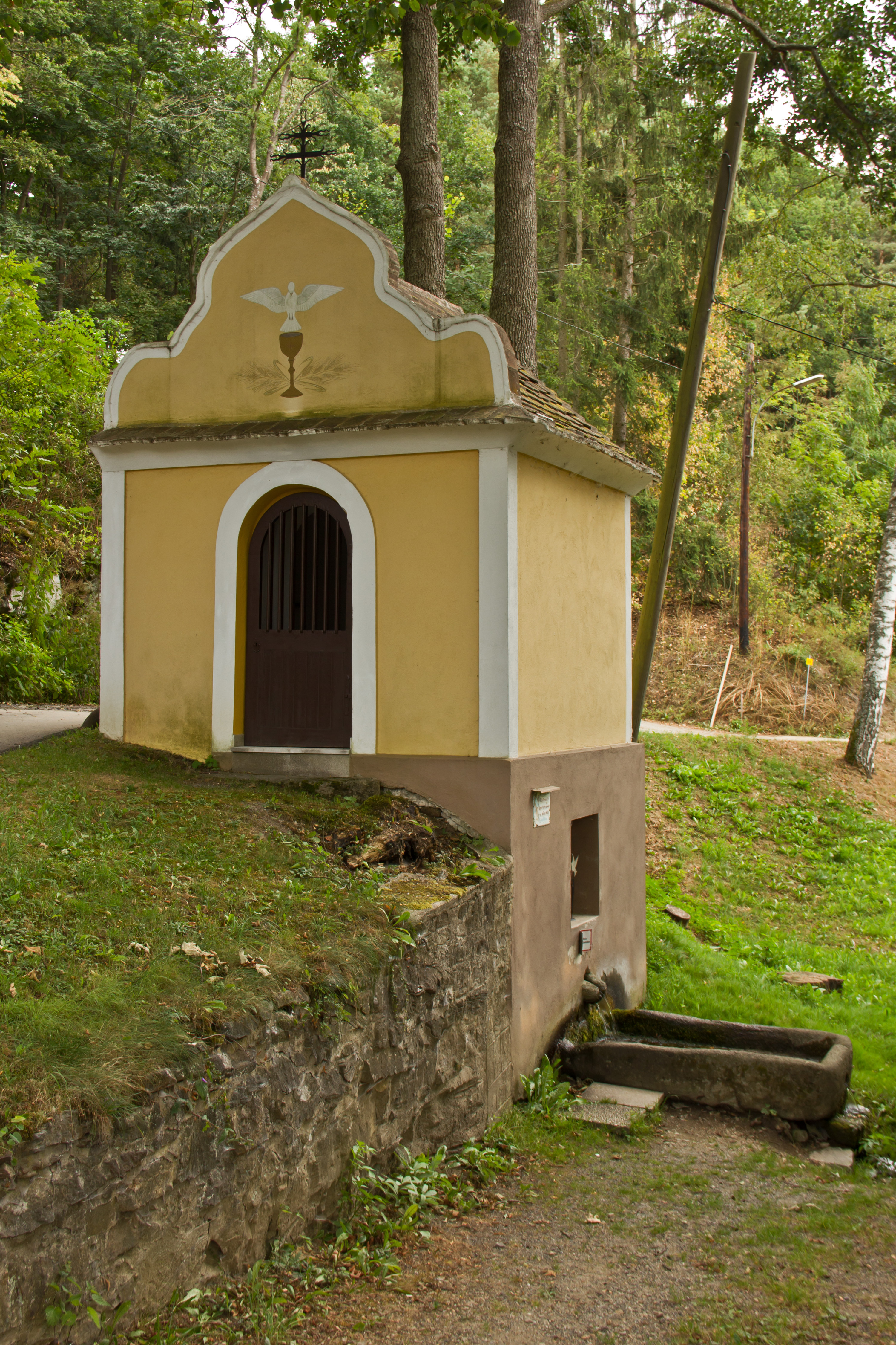 Die Klafferkapelle am Südende des Ortes ist ein faschengegliederter, innen platzlgewölbter Bau von 1835 mit einem geschwungenen Giebel unter Schmiedeeisenkreuz mit volkskundlichen Andachtsobjekten im Inneren. Sie erhebt sich über der Klafferquelle an einer Geländestufe nahe der Thaya.